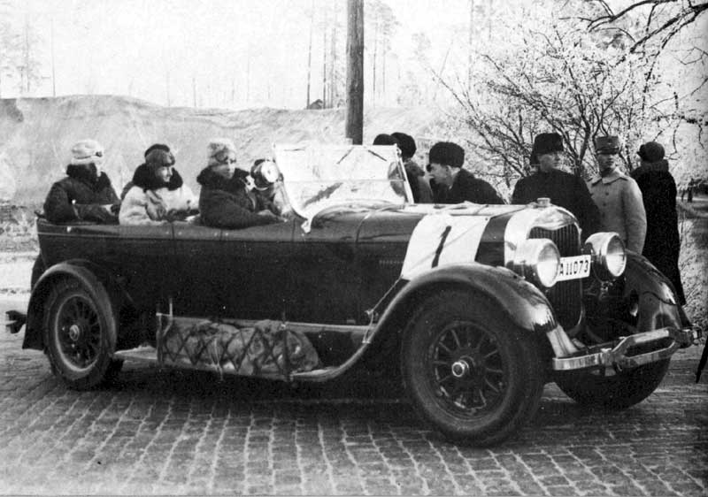 I KAK:s Vintertävling 1927 ställde bilhandlaren Ernst Nilson upp med denna Lincoln modell L 7-sits Touring med registreringsnummer A11073. Bilens tillverkningsår lär vara 1926.